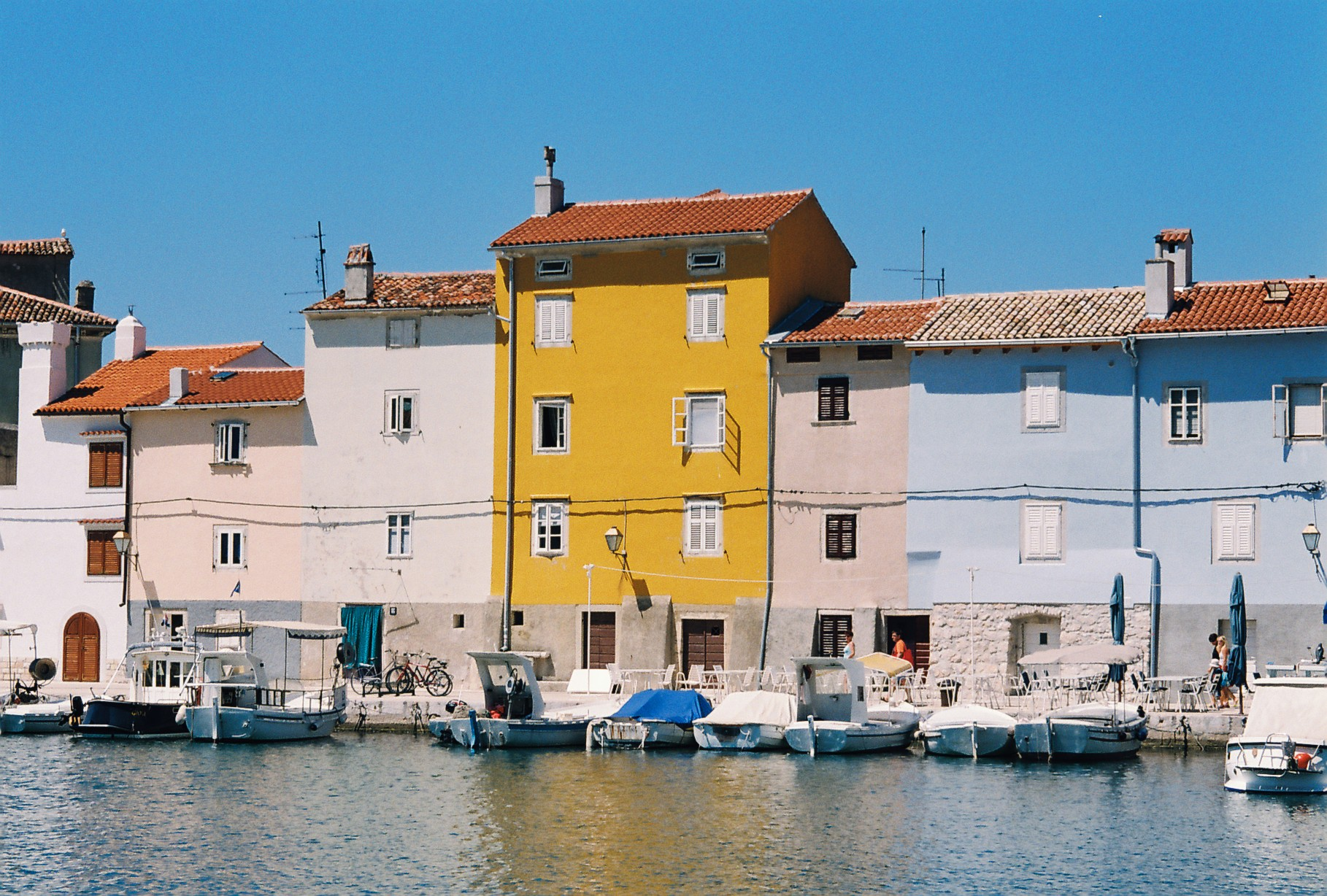 Srpskohrvatski / српскохрватски: 15.07.2008.